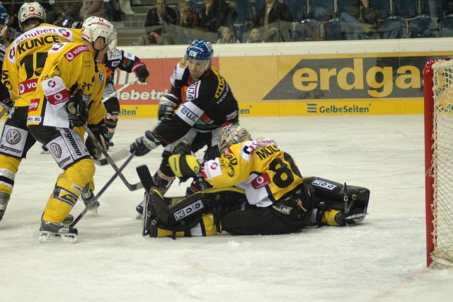 Torszene Krefeld Pinguine - Augsburger Panther